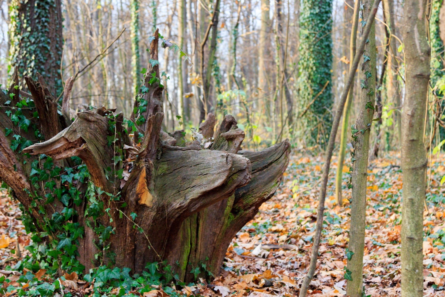 Porost břečťanu na pařezu v přírodní památce Bažantnice v Satalicích. Listopad 2017